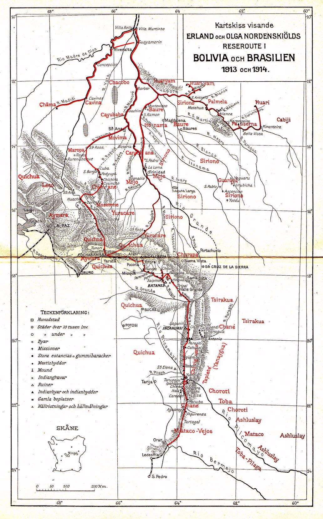 Kartskiss visande Erland och Olga Nordenskiölds reseroute i Brasilien och Bolivia 1913-1914. I rött anges namnet på olika folkgrupper i området vid denna tid.